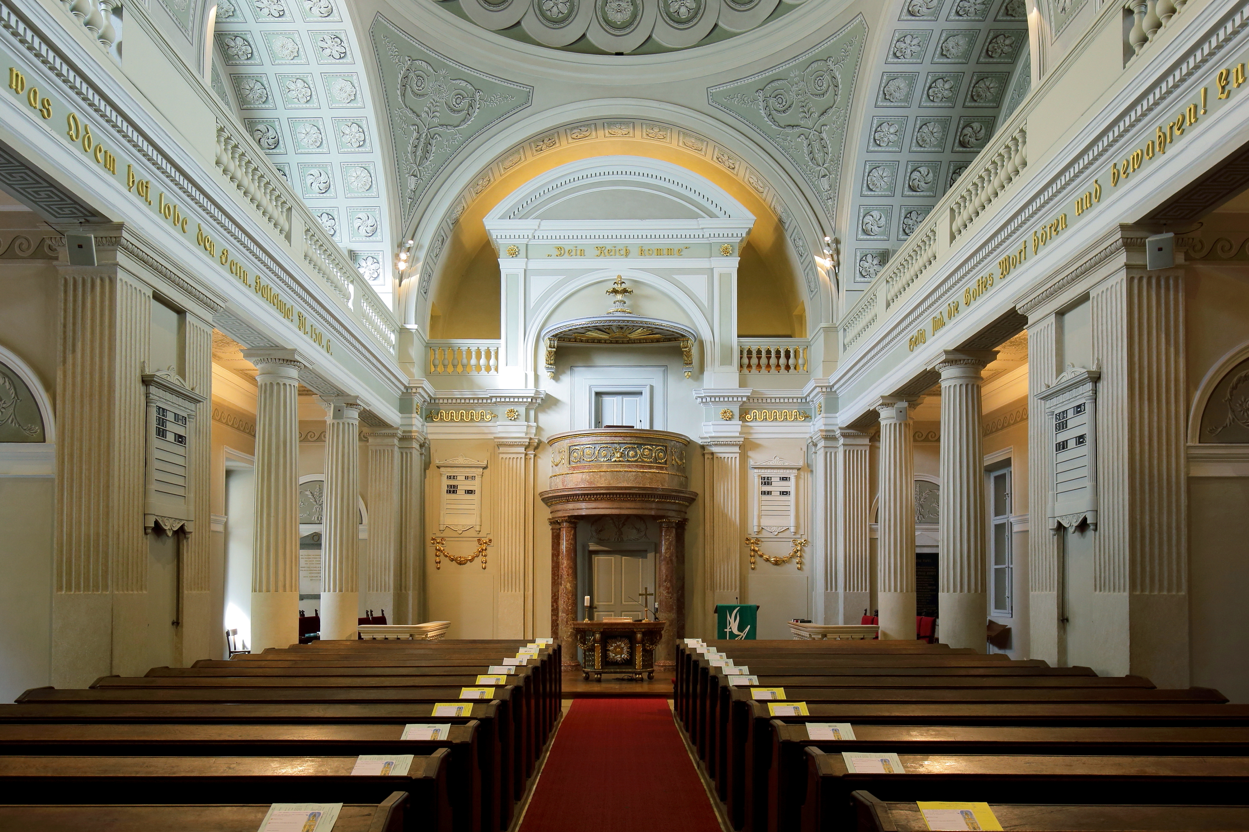 Innenansicht der Reformierten Stadtkirche im 1. Wiener Gemeindebezirk Innere Stadt.